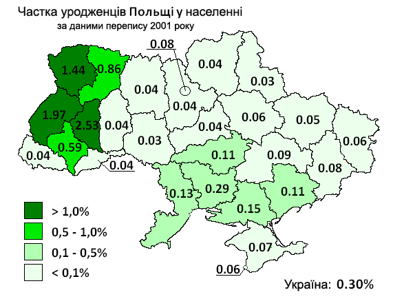 Частка населення народженого на території сучасної Польщі за даними перепису 2001 р.